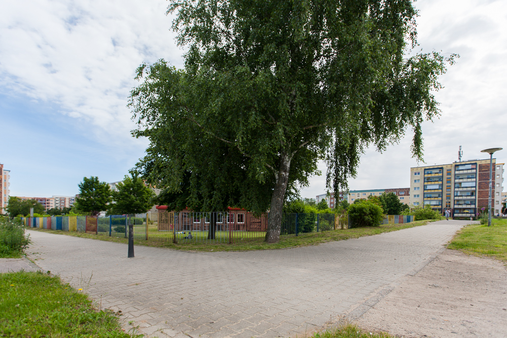 Rostock: Martin-Niemöller-Straße / Neudierkower Weg ist der Ort, an dem der Mord an Mehmet Turgut durch den NSU stattfand.